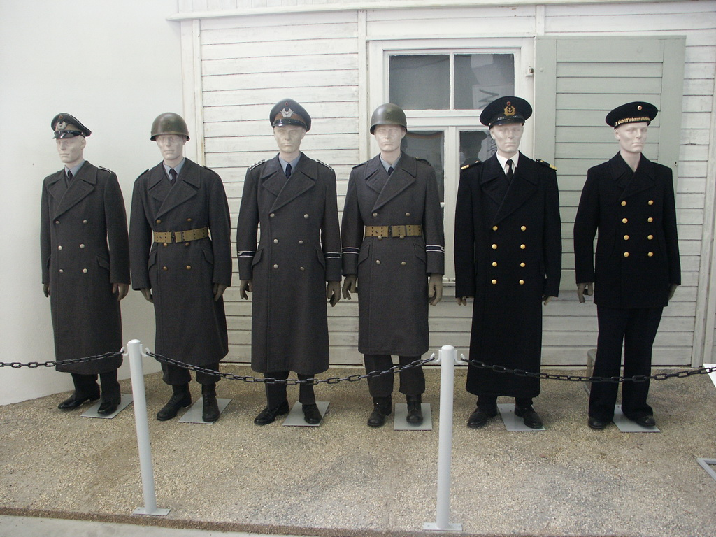 Bundeswehrmuseum Dresden mit Bundeswehruniformen aus den frühen 1960er Jahren